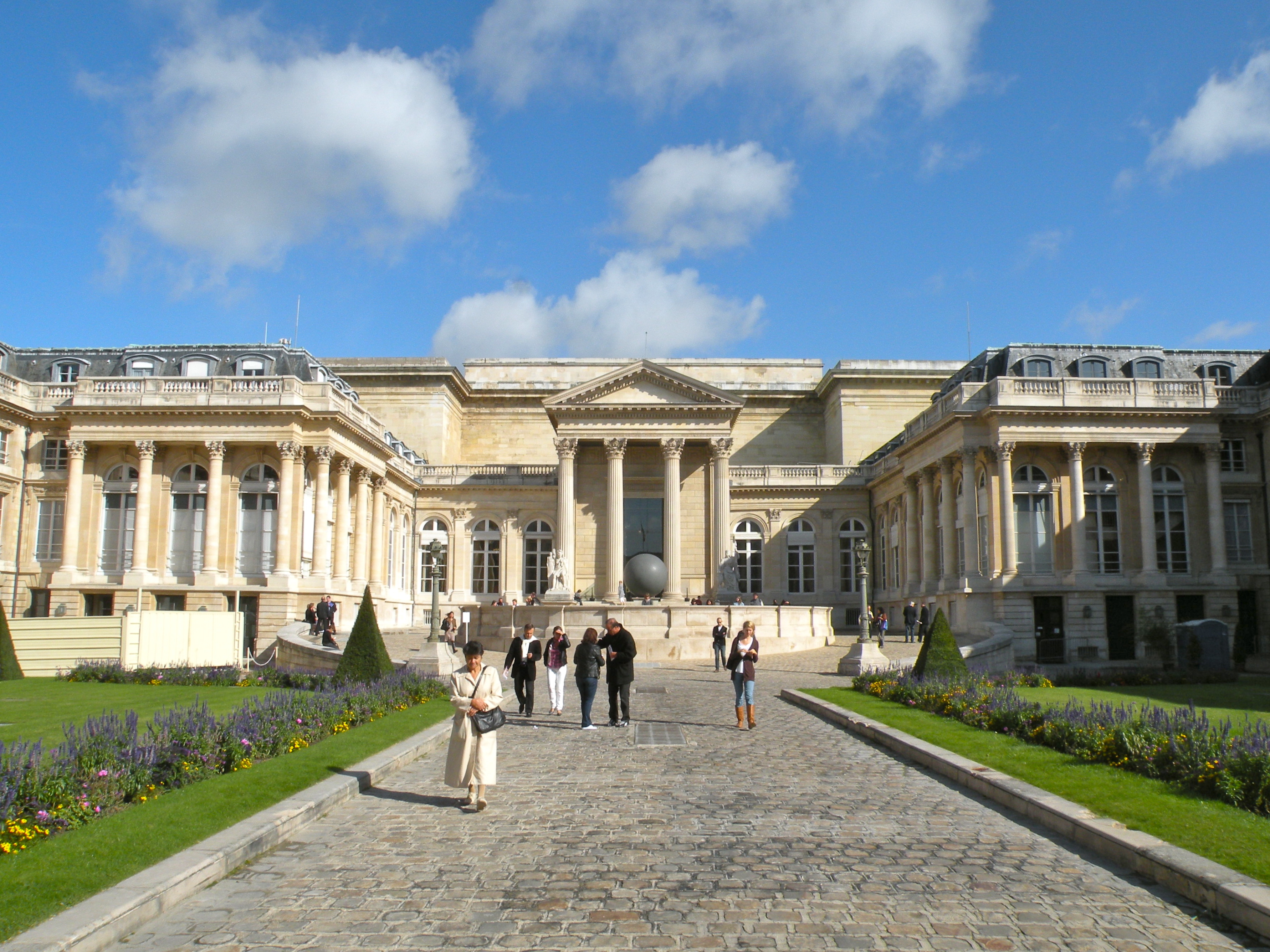 vue sur la façade depuis la cour d'honneur